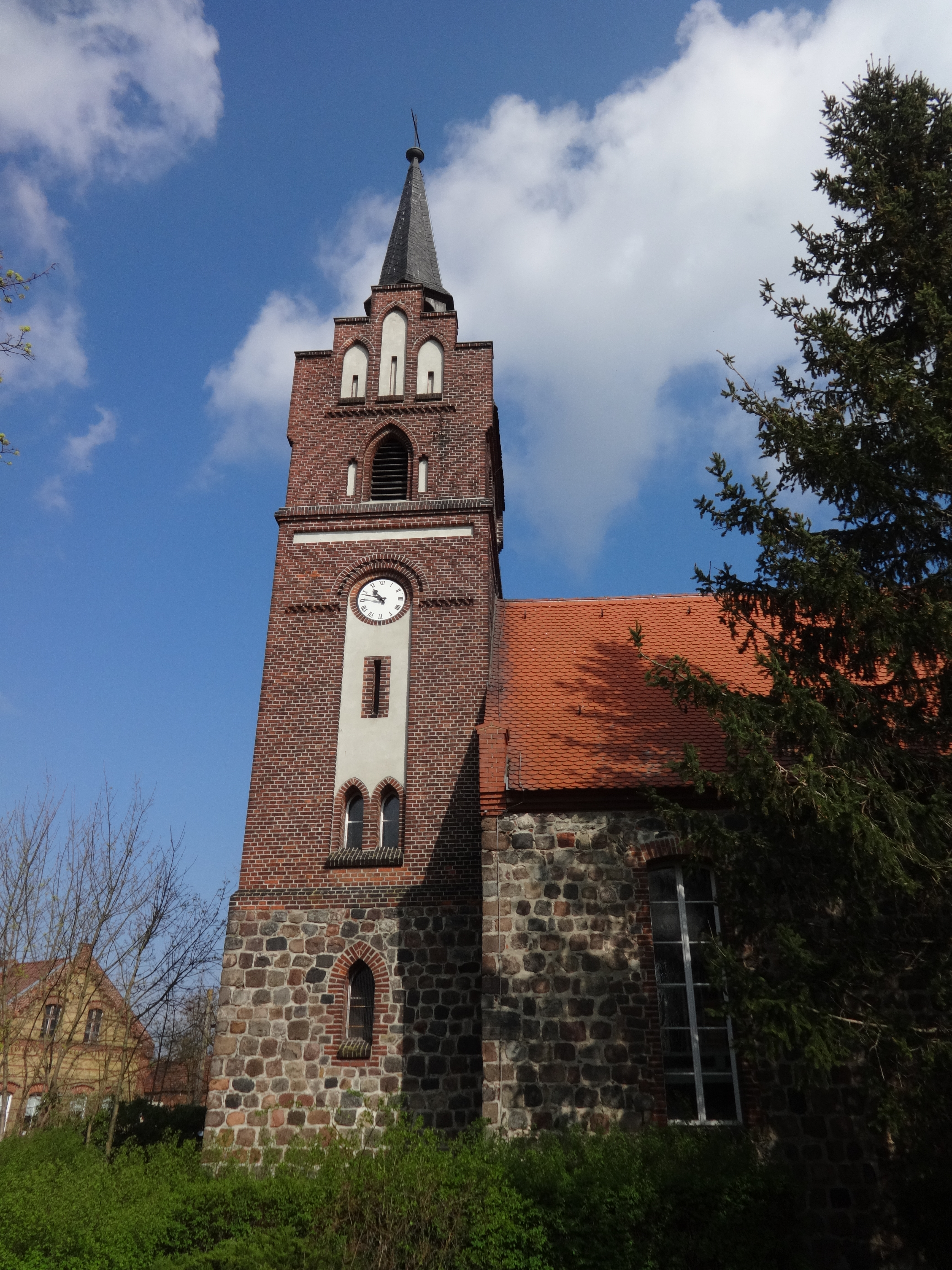 Die Dorfkirche in Münchehofe (Gemeinde Hoppegarten) entstand im 13. Jahrhundert aus Feldsteinen. Die oberen Geschosse des Westturms wurden in der zweiten Hälfte des 19. Jahrhunderts aus Mauerstein erneuert. Im Innern befinden sich unter anderem ein Kanzelaltar aus dem 18. Jahrhundert mit Bildern Jesu Christi und den Evangelisten.